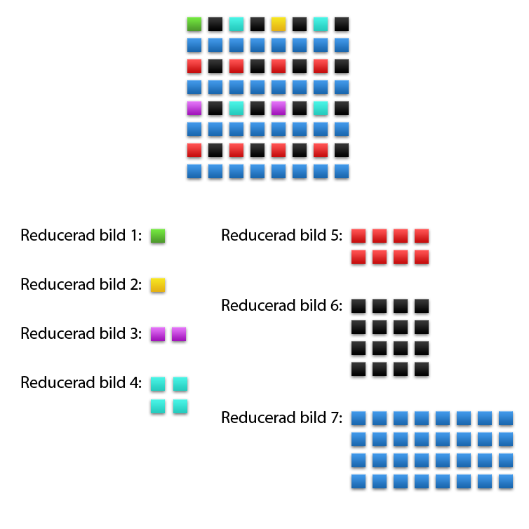 Metod för att reducera en bild enligt Adam7